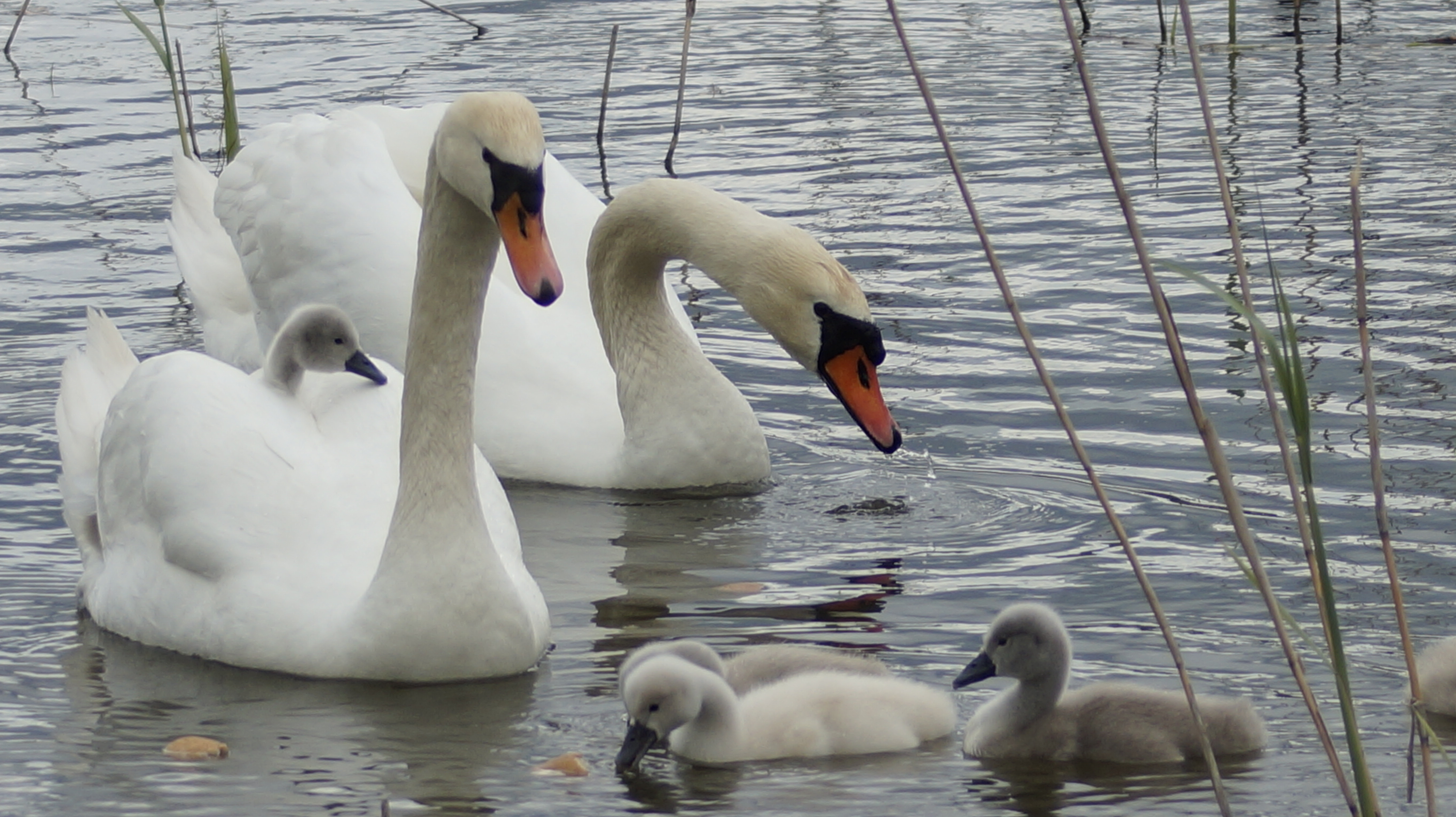 Schwanenfamilie